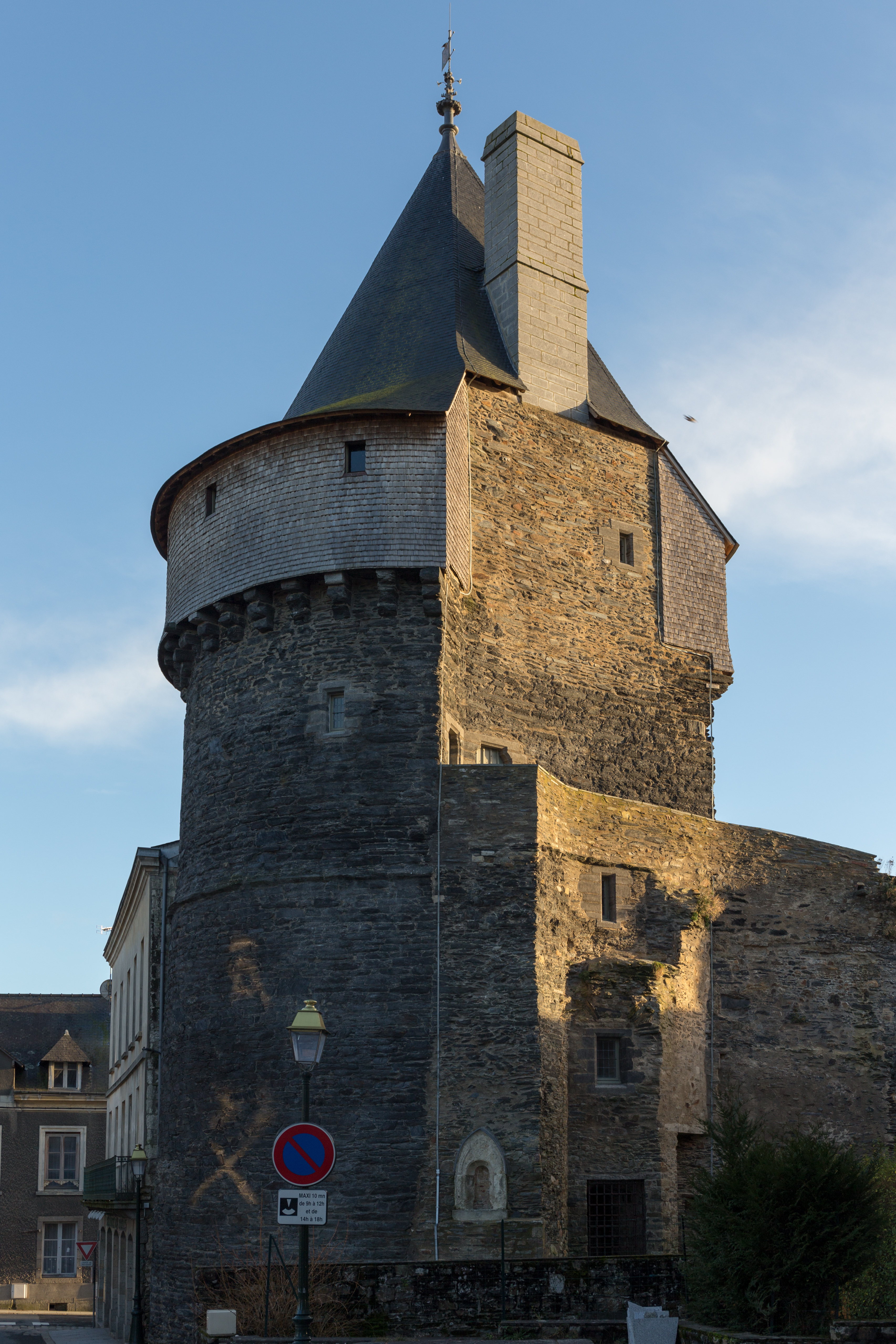 Tour de la Bridolle à Vitré.